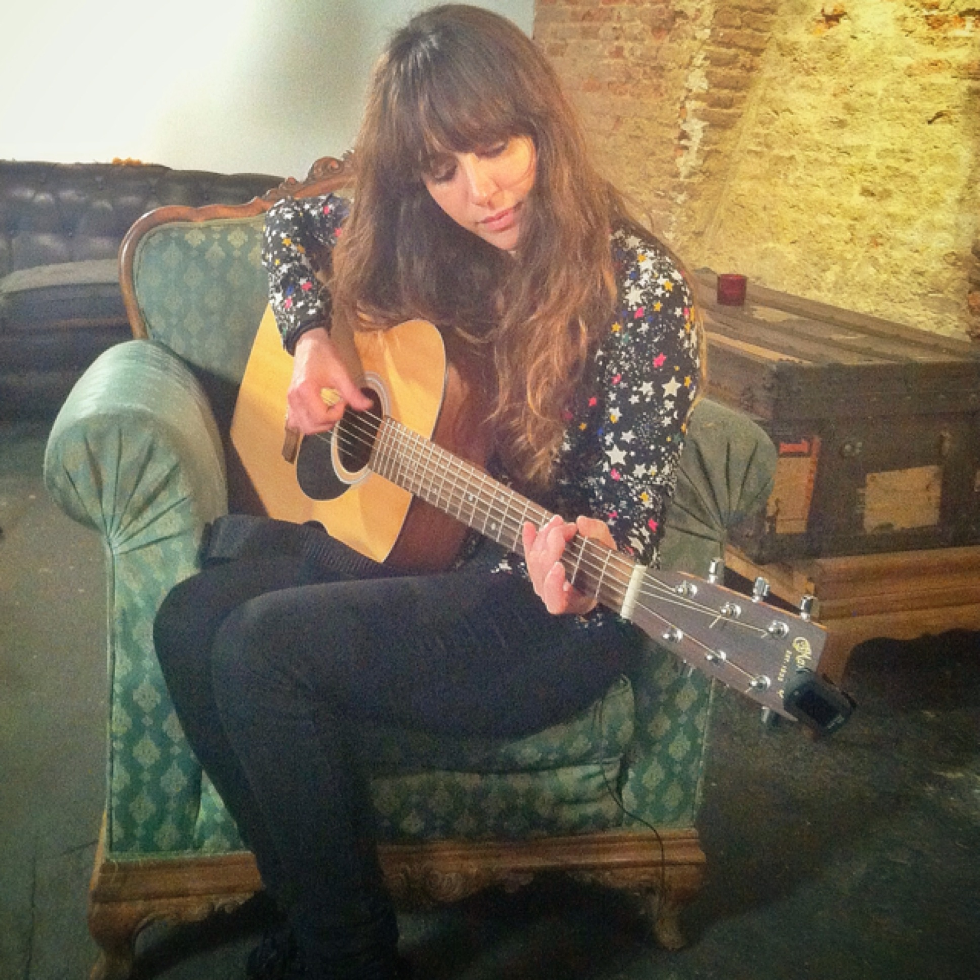 Mai Meneses de Nena Daconte en exclusiva